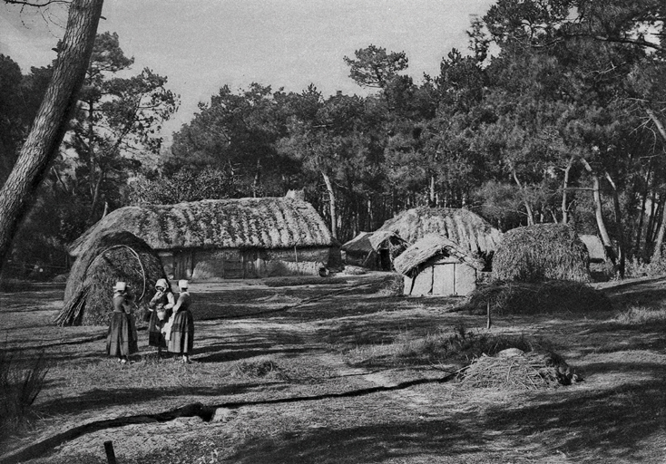 Une bourrine photographiée par Jules-César Robuchon (1840-1922) sur la commune de Saint-Hilaire-de-Riez en Vendée, France.